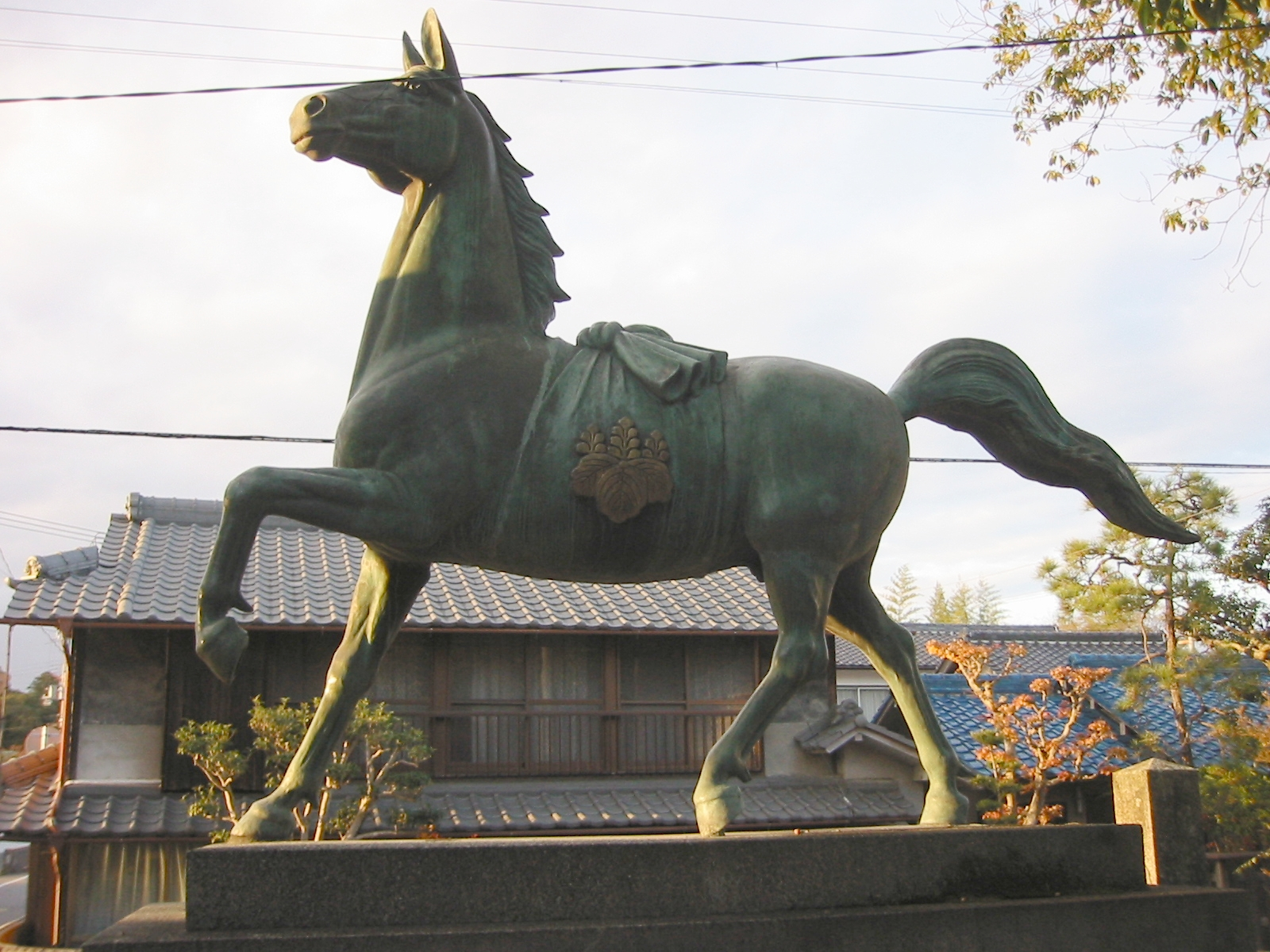 三木市天津神社のシンボル、馬の像